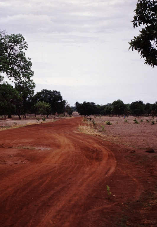 Auf der Norduferstraße (Northbank) Richtung Fatoto, ganz im Osten von Gambia